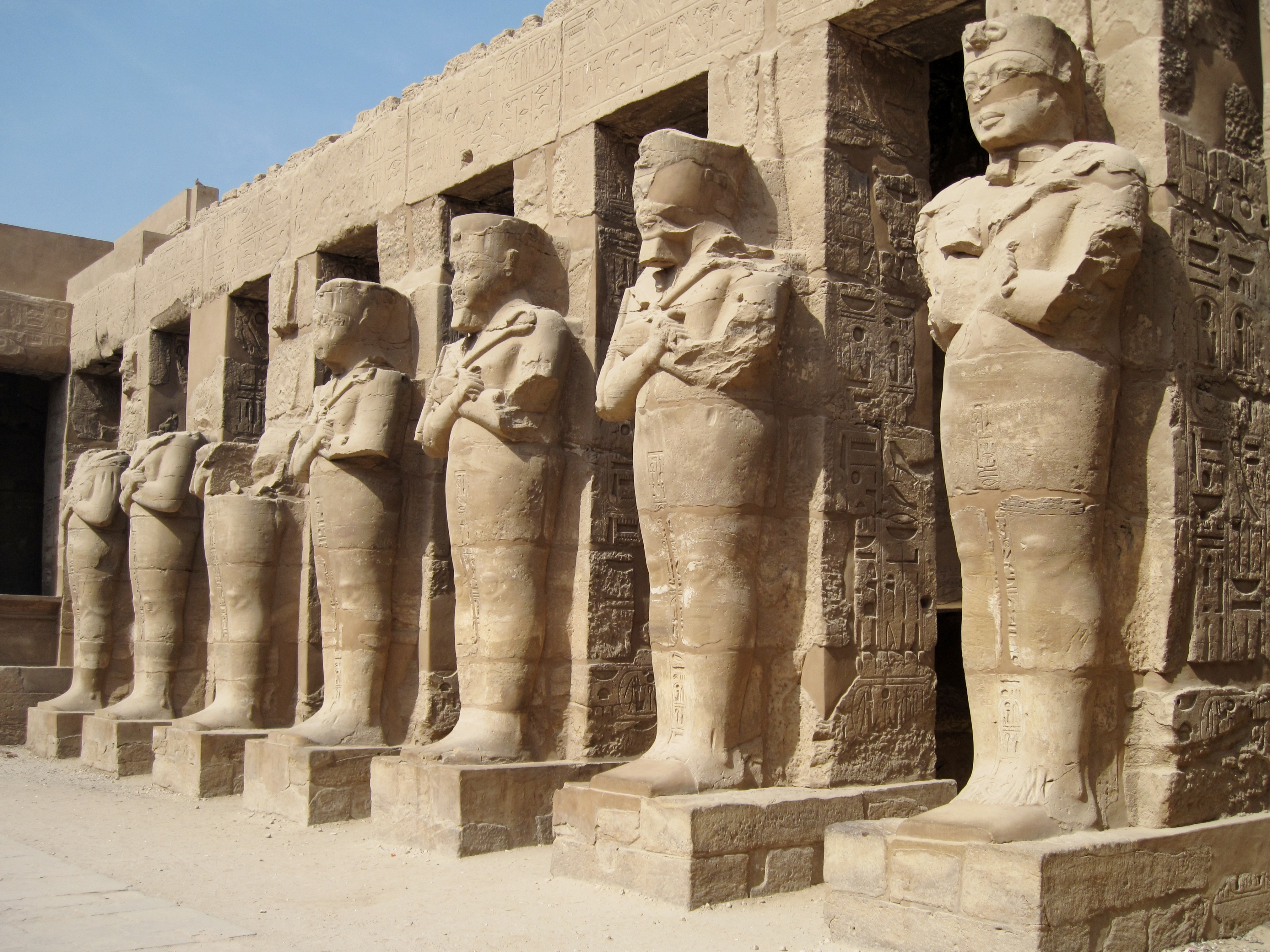 Osirispfeiler im Tempel von Ramses III. am Vorhof des Tempels von Karnak nördlich Luxor, Ägypten